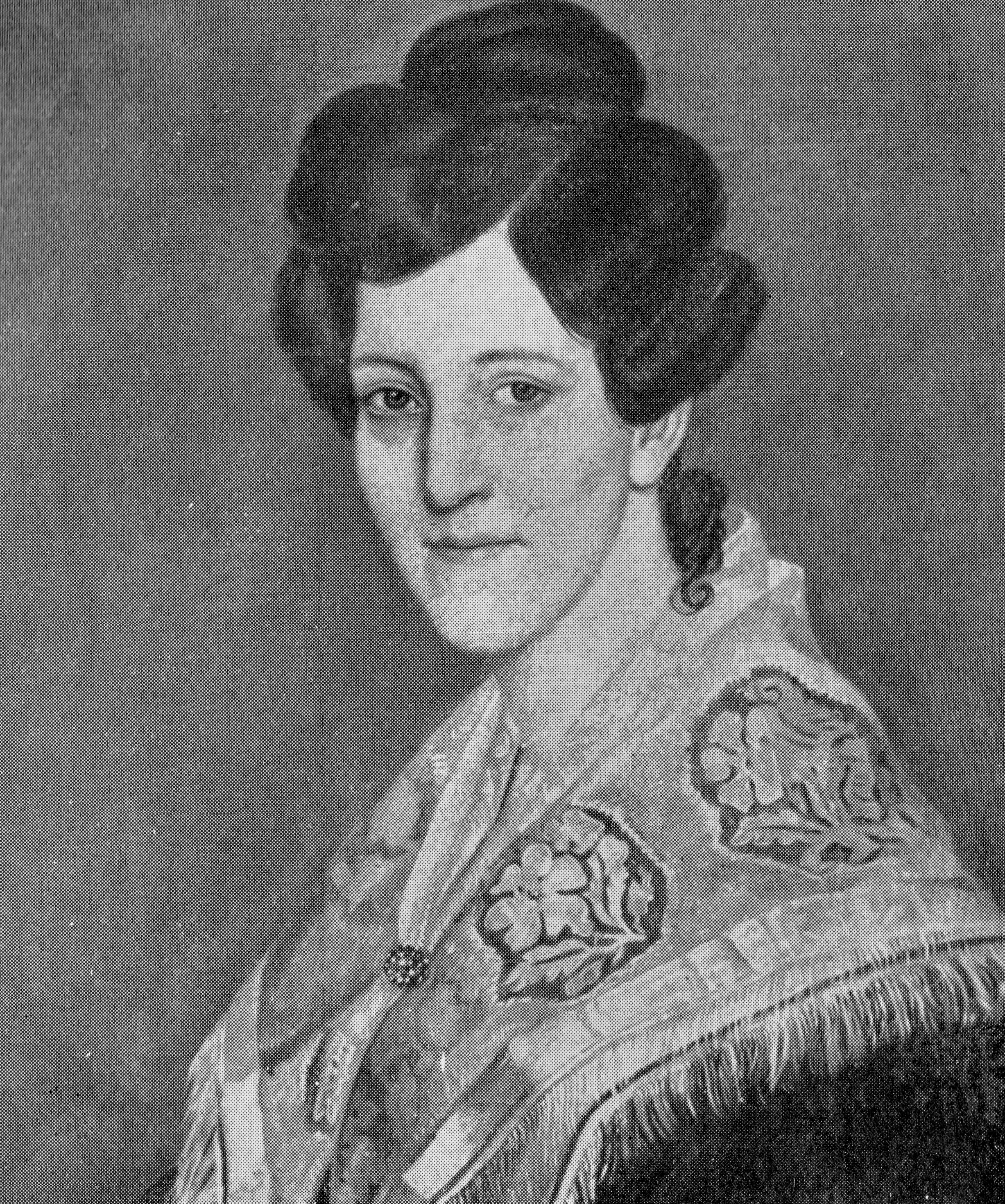 Sarah Oncken, geborene Mann (1806 - 1845), 1. Ehefrau Johann Gerhard Onckens